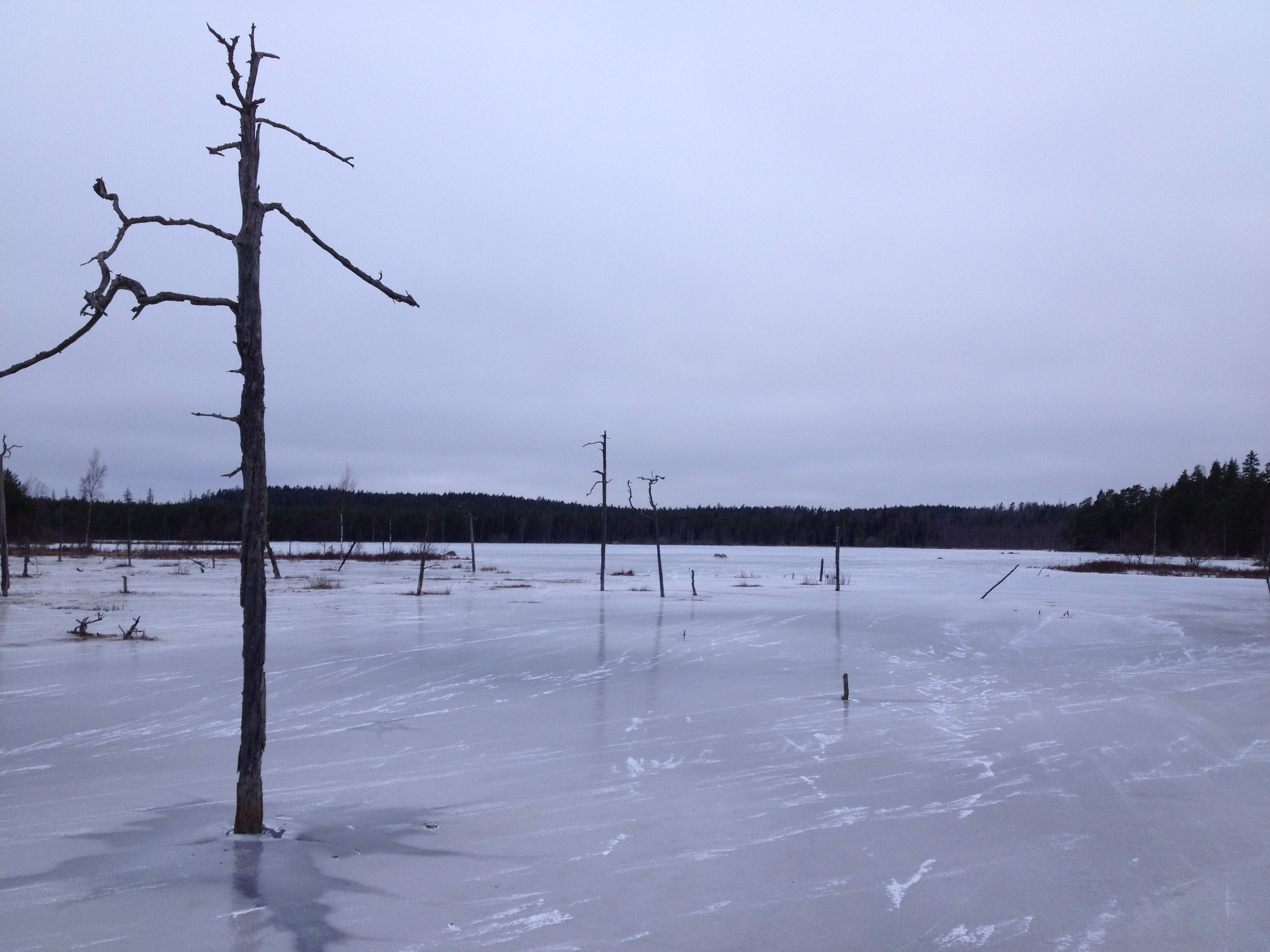 Sjön Läen vintertid